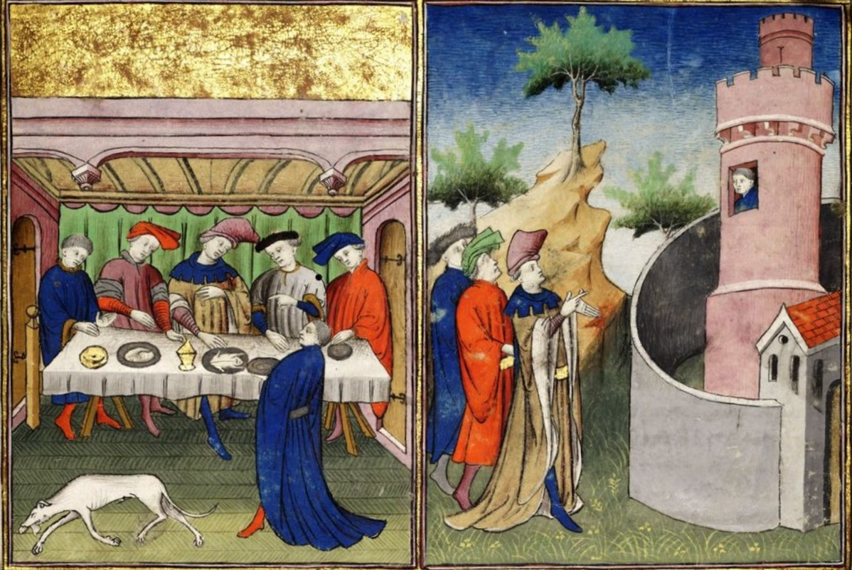 Le drame d'Orthez. A gauche, Fébus vient de faire l'essai sur son chien, aussitôt foudroyé, du contenu de la bourse de poudre arrachée au cou de son fils qui le servait à table. A droite, le comte et son entourage délibèrent sur le sort de Gaston, emprisonné dans le tour Moncade à Orthez.